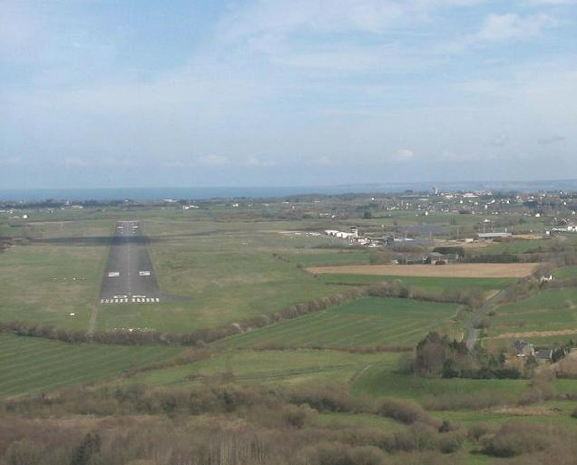 Photographie aérienne prise le 9 avril 2006.